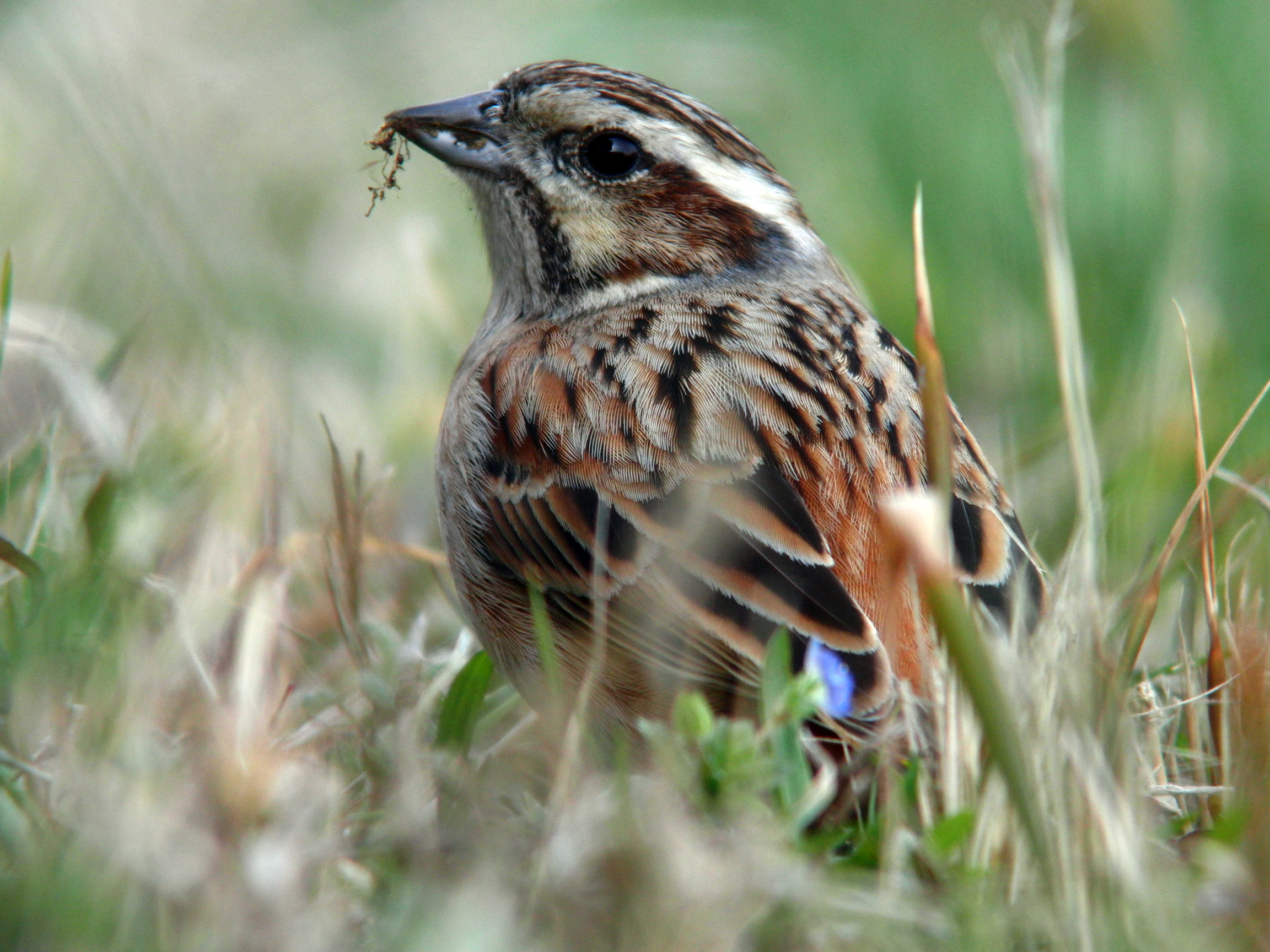 ホオジロ。東京港野鳥公園?